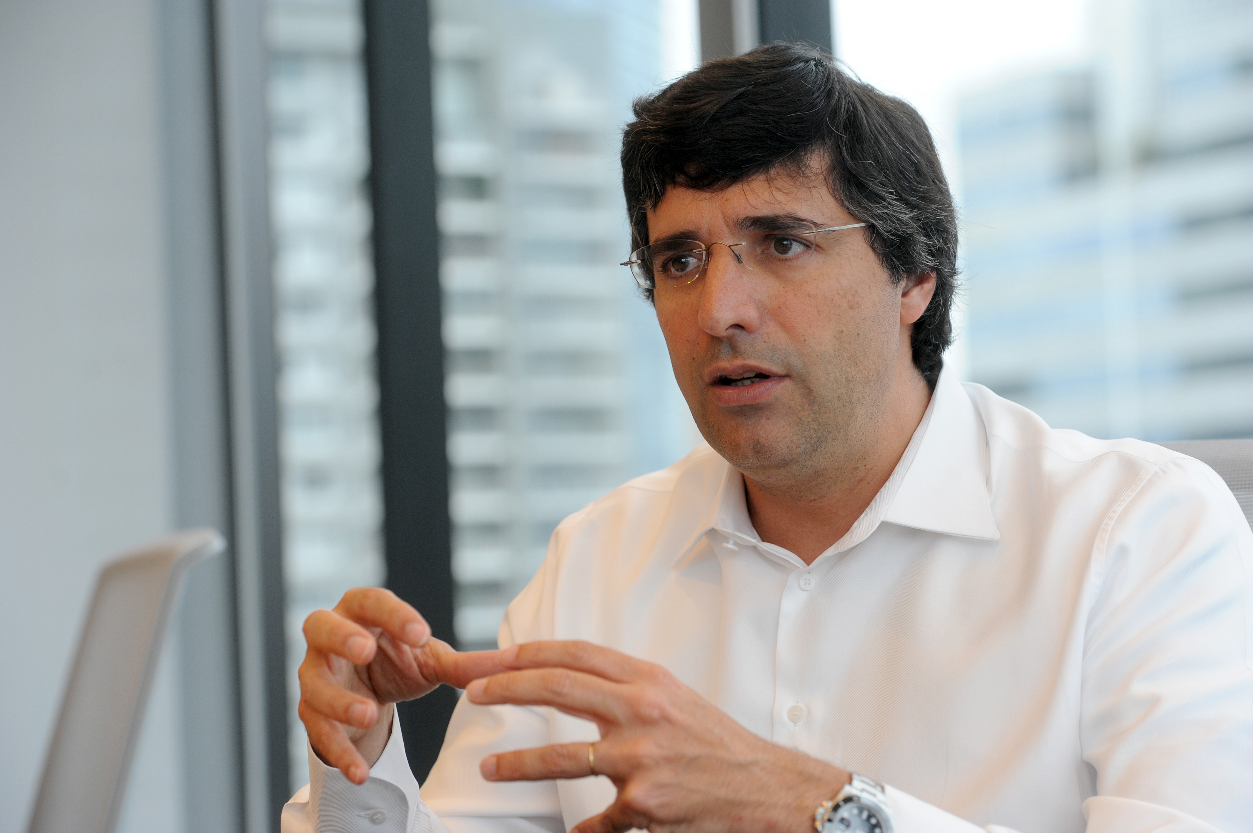 BTGPactual / Centro de Operações e CEO - São Paulo - data: 08/08/2014 - André Esteves, CEO do Banco BTGPactual. Foto: Luiz Prado/ LUZ